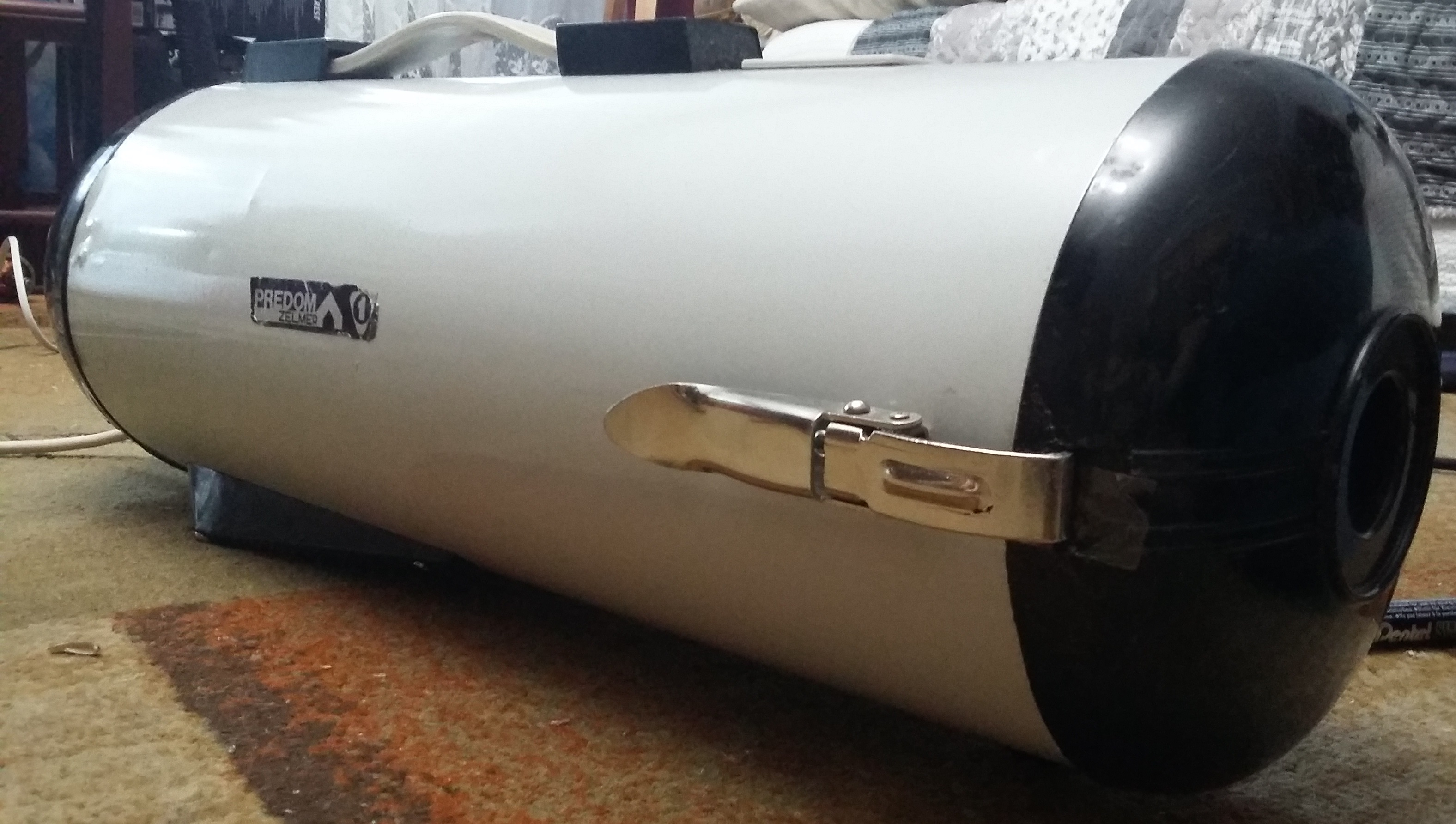 Zelmer typ 54s z ostatnich lat produkcji